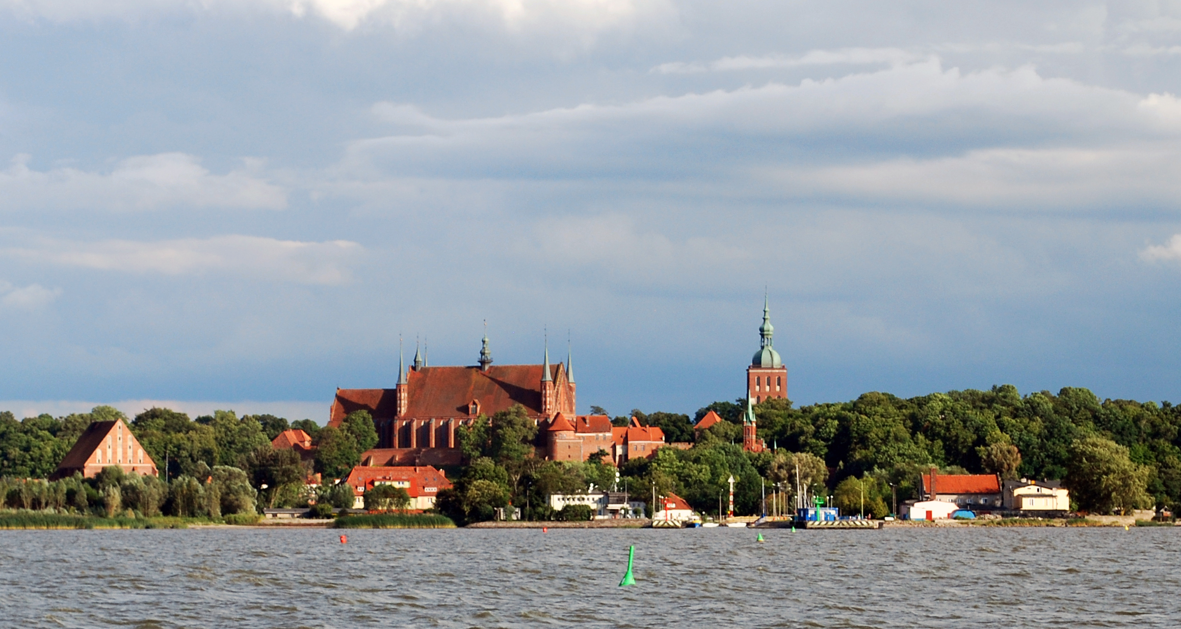 Panorama Fromborka ze statku "Anita"